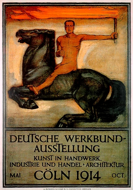 Plakat nach einem Entwurf von Peter Behrens für die Deutsche Werkbund-Ausstellung Kunst in Handwerk, Industrie und Handel, Architektur im von Mai bis Oktober 1914 in Köln. Druck durch die A. Molling & Comp. KG, Hannover-Berlin. Maße des Originals circa 89,2 cm x 62,5 cm, auf schwerem Papier gedruckt.